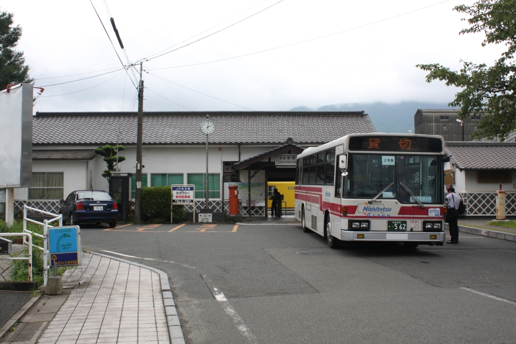 日田バスによる久大本線代行バス